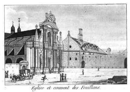 "Eglise et couvent des Feuillans"